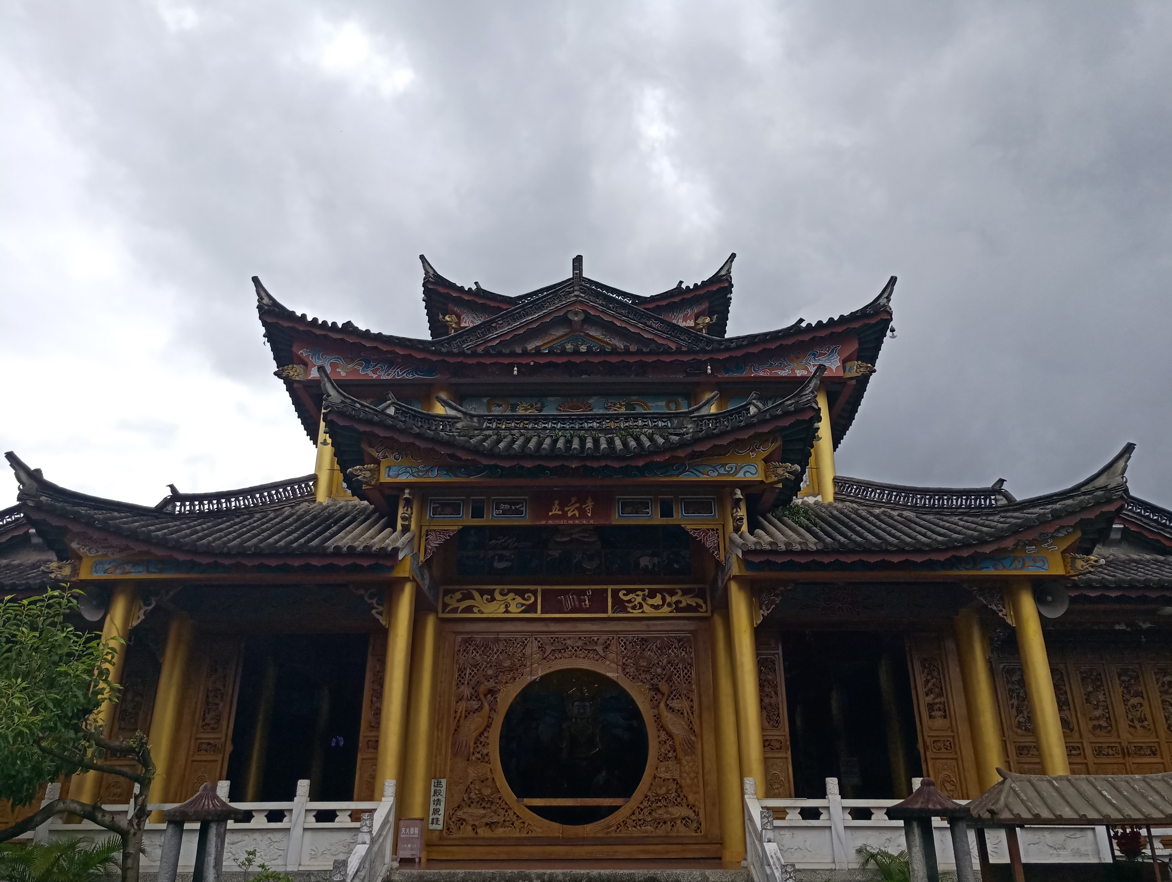 芒市五云寺